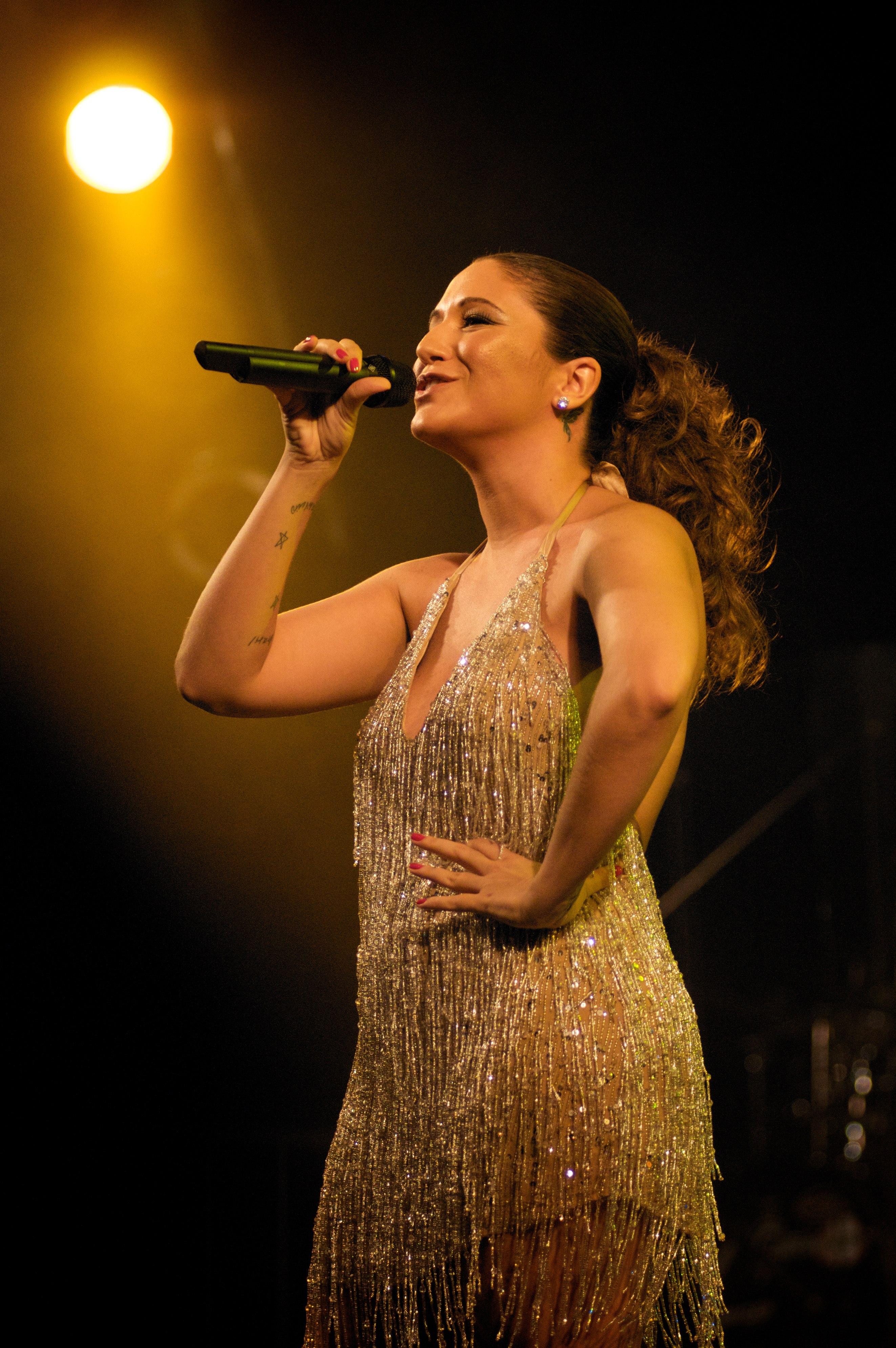 Maria Rita na Virada Cultural 2009.